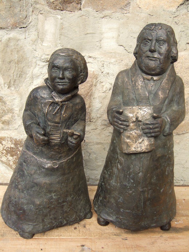 Bronze Katharina und Martin Luther